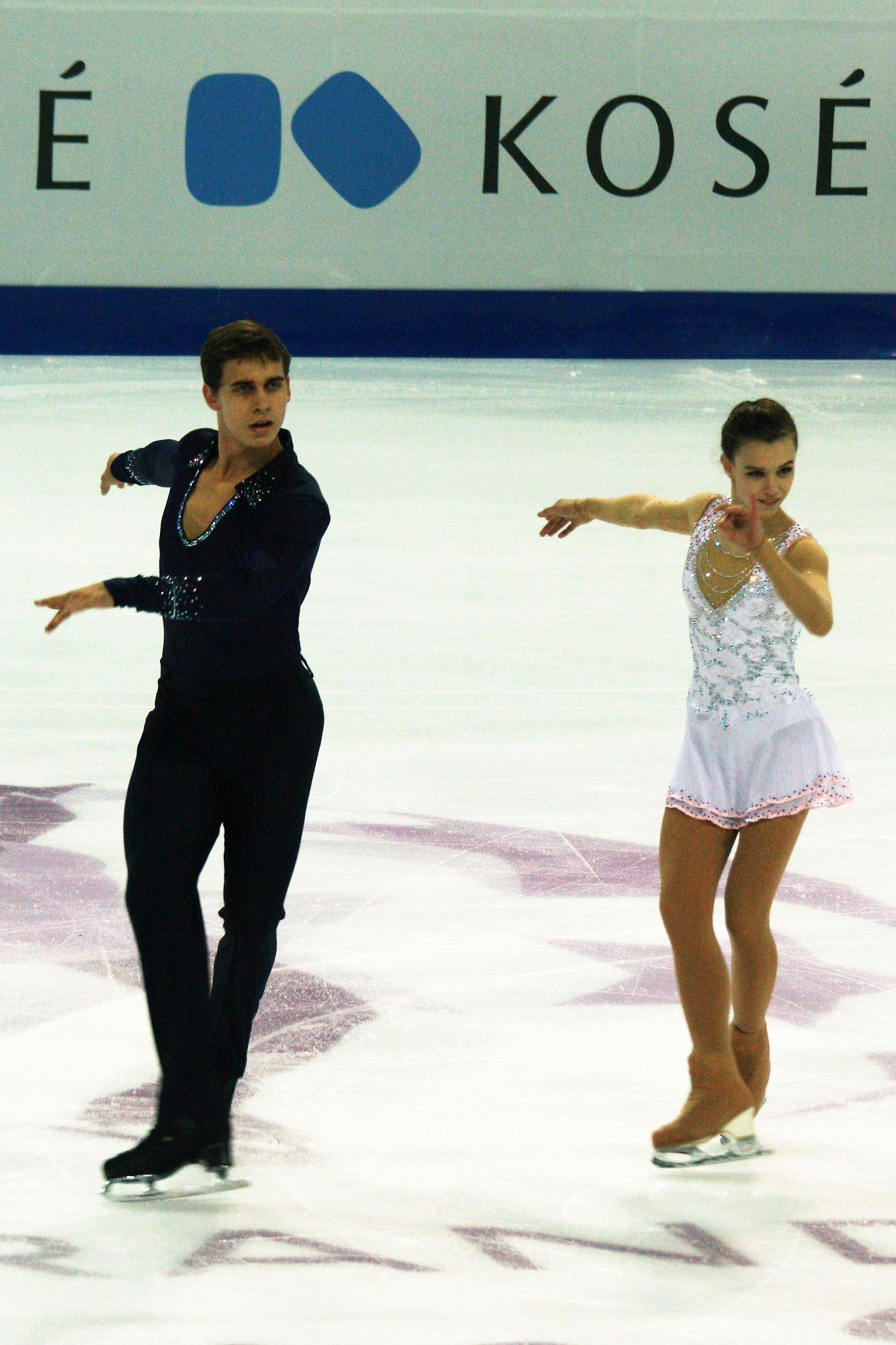 Анна Душкова / Мартин Бидар (Чехия) на финале Гран-при по фигурному катанию среди юниоров 2016-2017